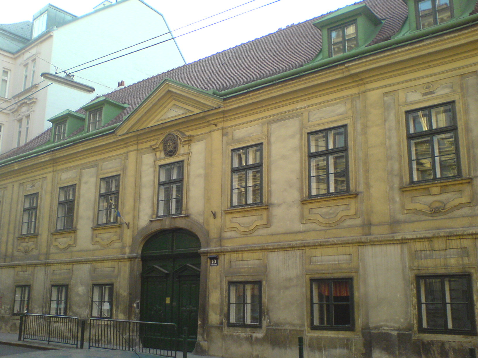 Gebäude der Schwedisch-Evangelisch-Lutherischen Kirche in der Gentzgasse in Wien-Währing